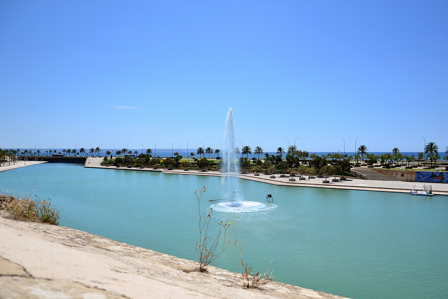 Palma de Mallorca, Balearen, Spanien, Datum/Uhrzeit: 03.06.2013 12:56:33